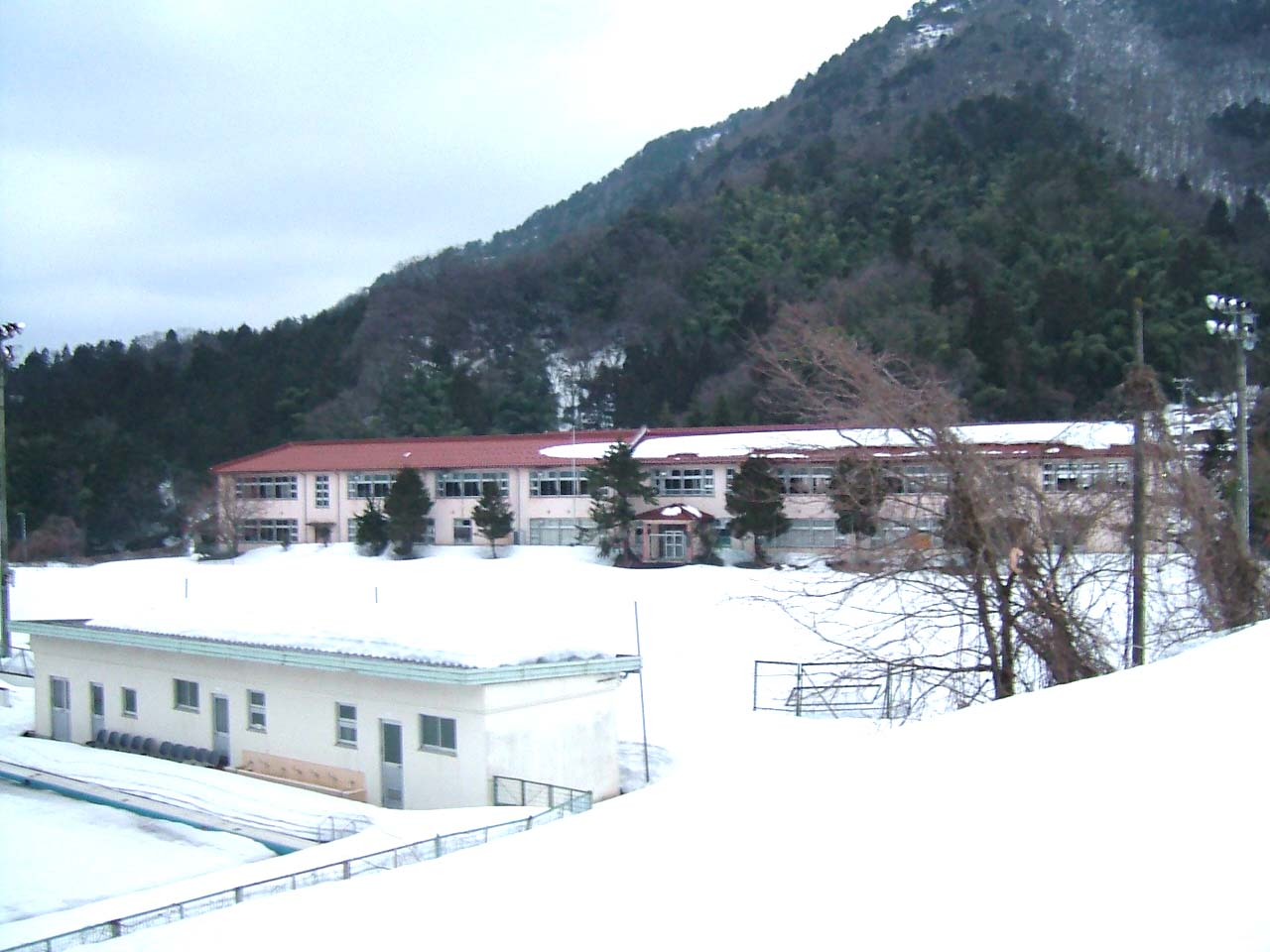 新温泉町立照来小学校旧校舎 旧温泉町立照来中学校先代校舎